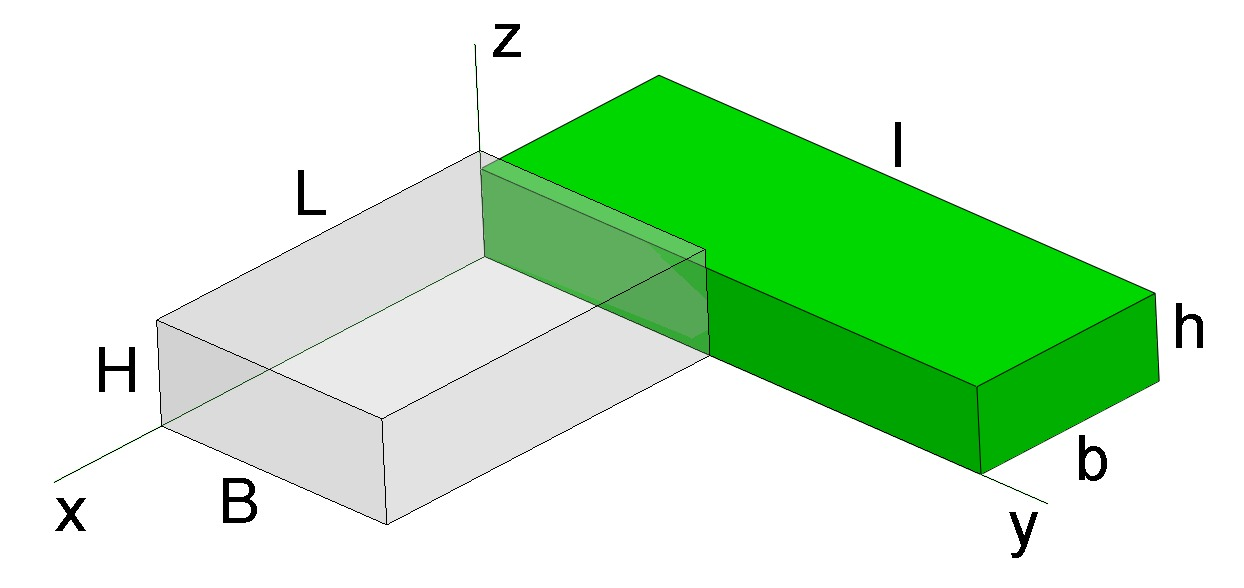 Uniaxiale Verformung mit Drehung um 90 grad